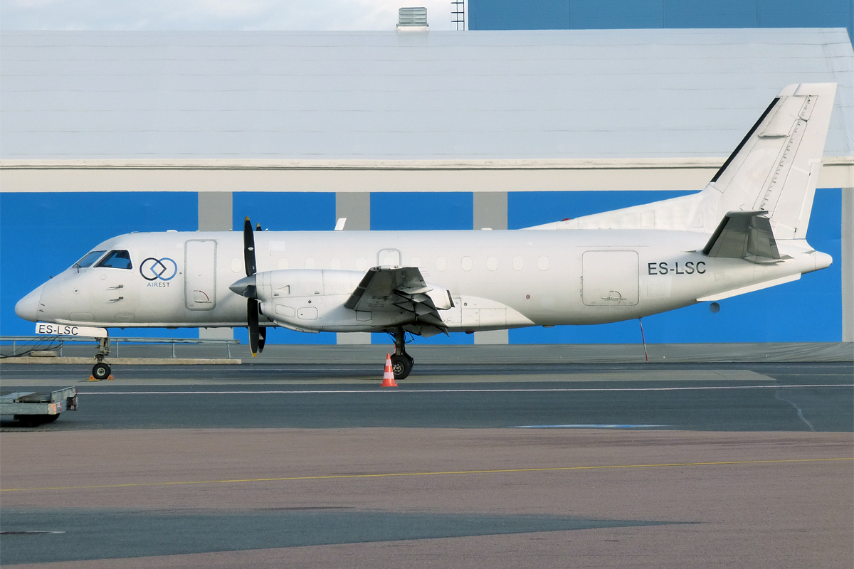 Airest, ES-LSC, Saab 340AF